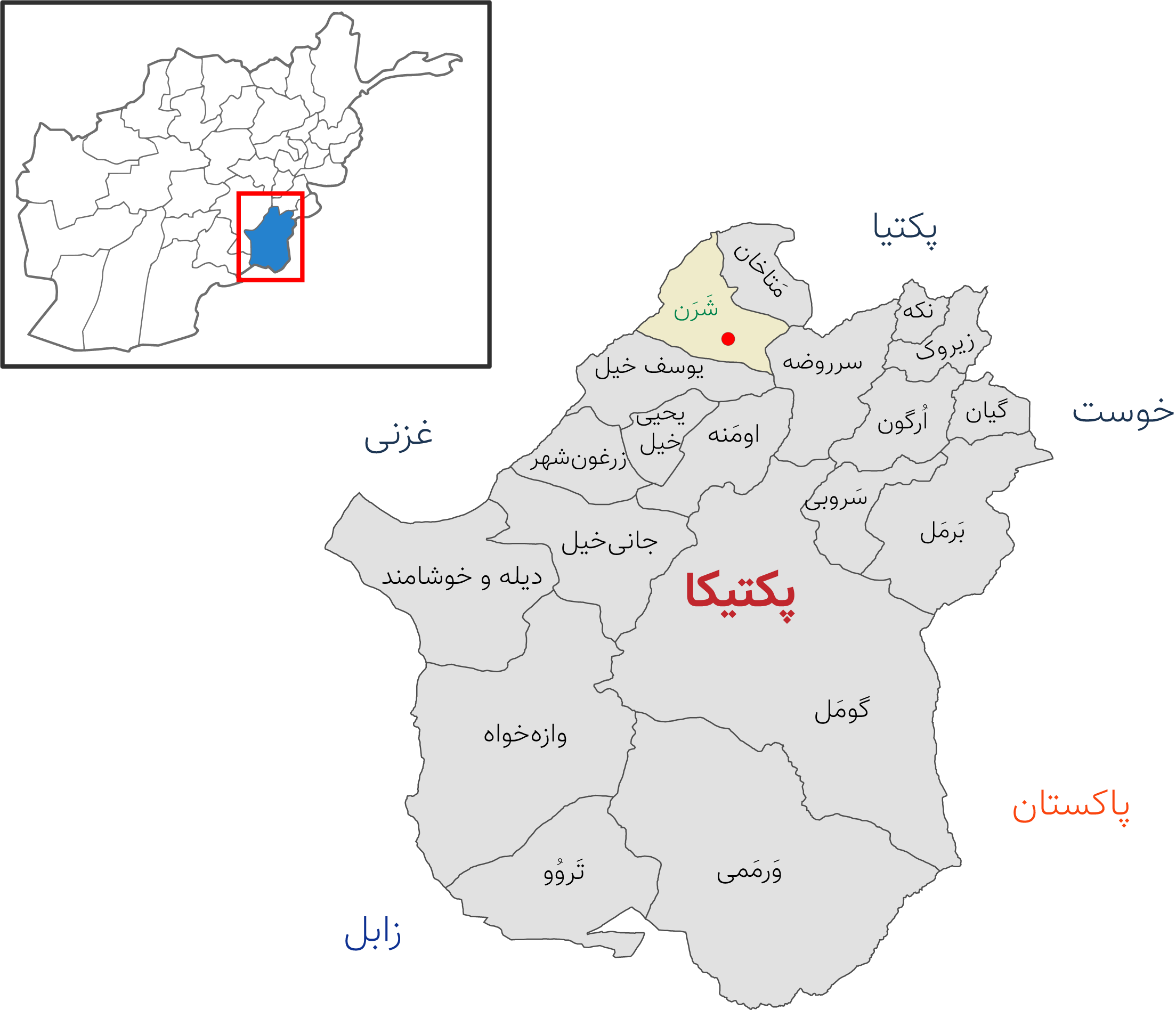 نقشه ولایت پکتیکا